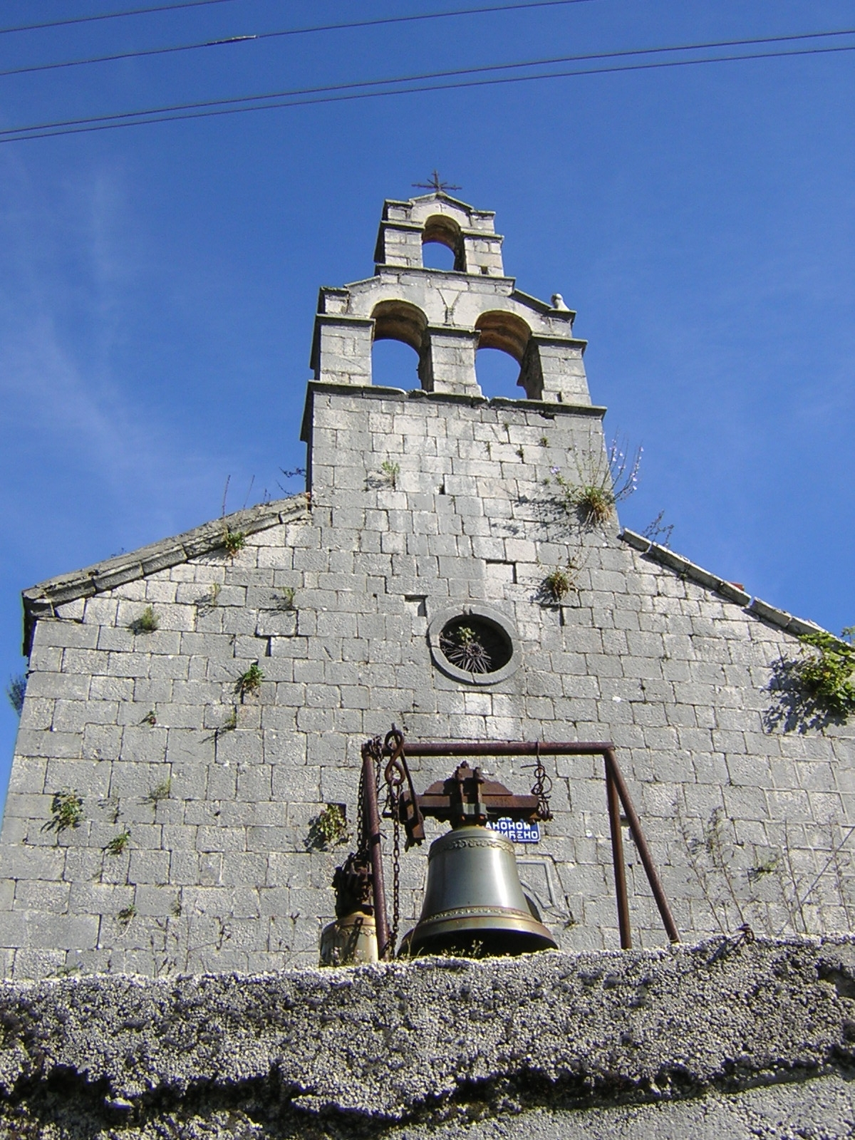 Njegu?i